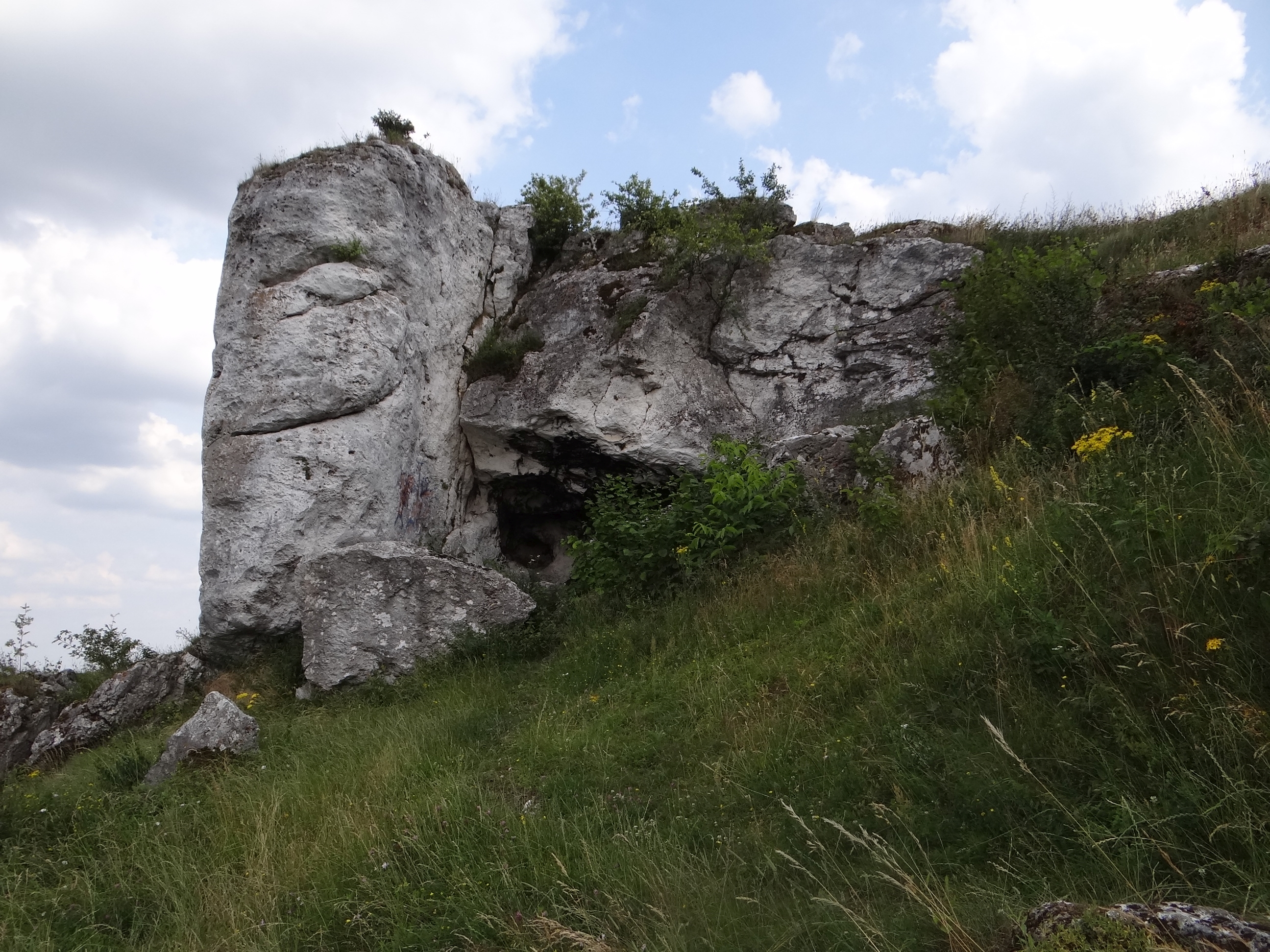 Góry Towarne Duże